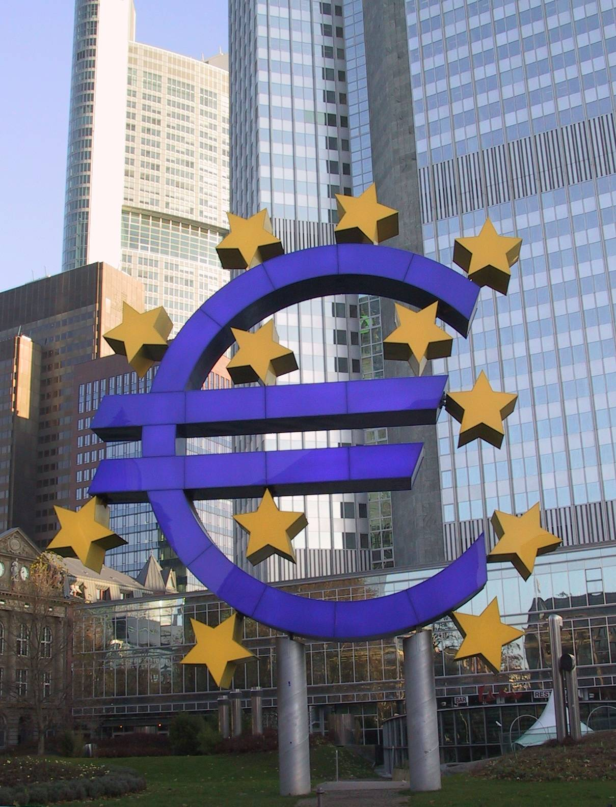 Description:Francfort - BCE - Euro Lieu:Francfort (Allemagne) Date:30 novembre 2004 Auteur:khardan Licence:GDFL